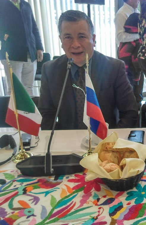 Reunión de Trabajo México - Rusia. Establecimiento de Programa para la Inversión de México. Octubre 2018.